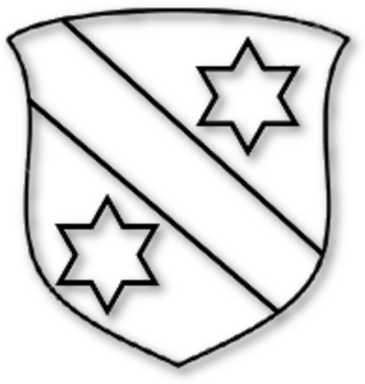 Blason Ellebodius (1576)